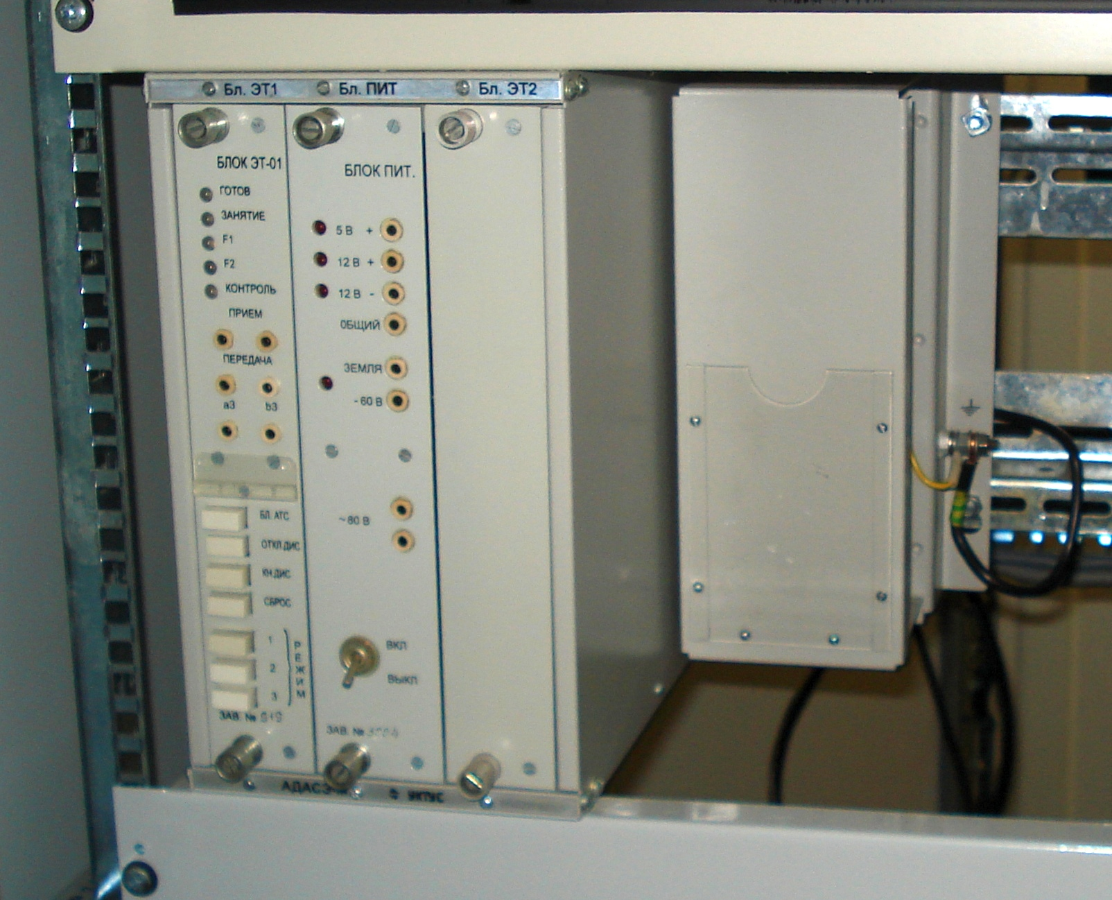 Контроллер телефонной связи с интерфейсом АДАСЭ.